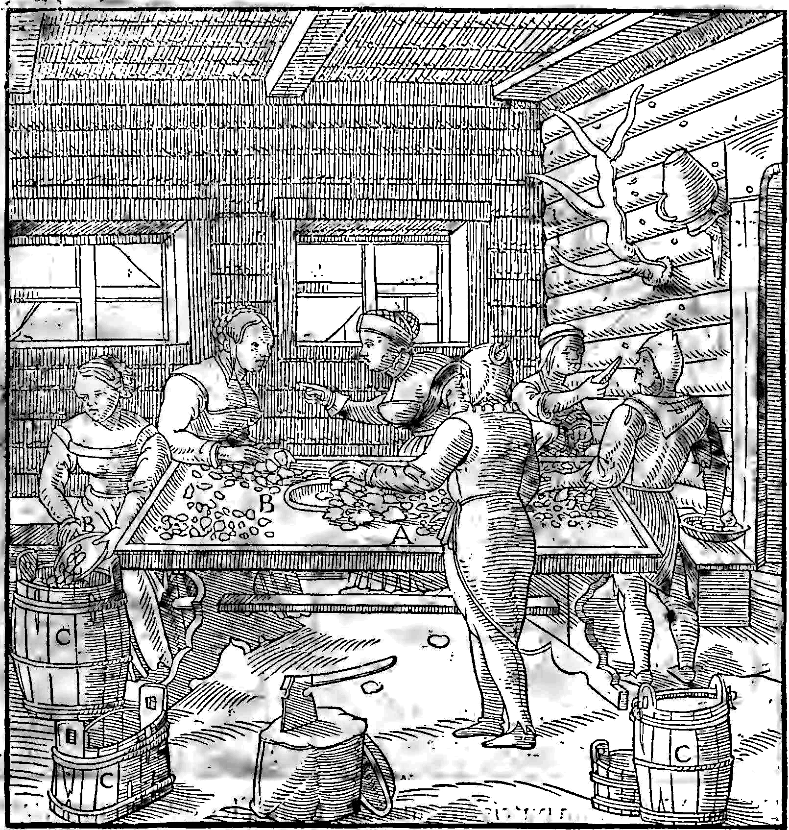 Incisione da De re metallica di Georg Agricola, Basilea, 1556